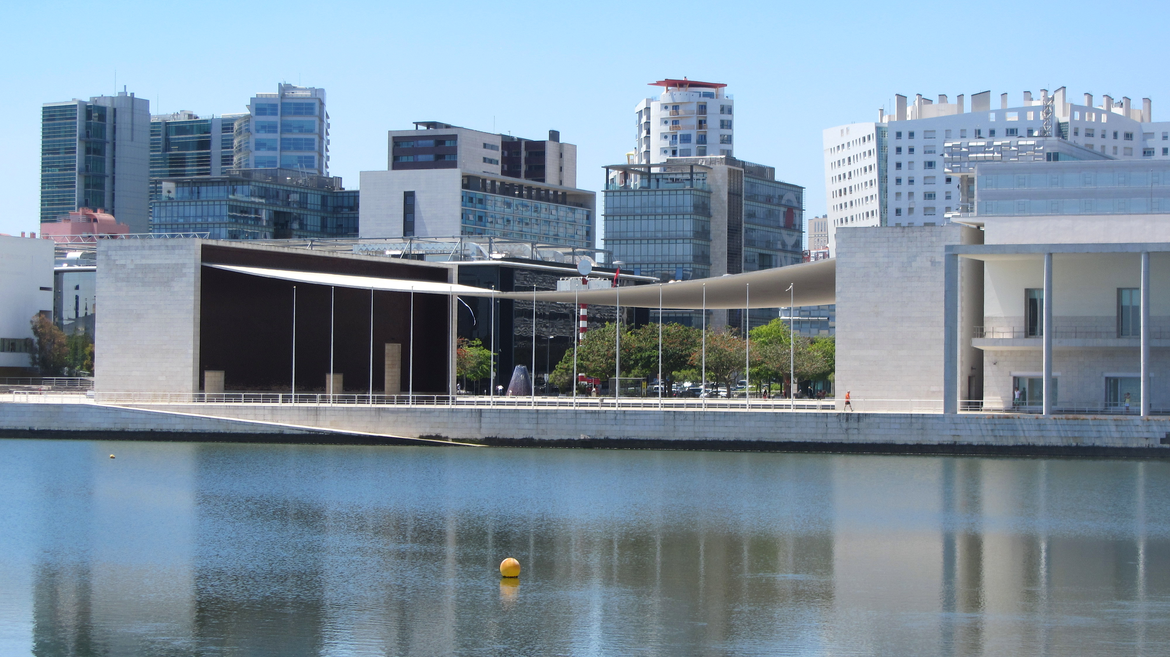 Lisbon 120